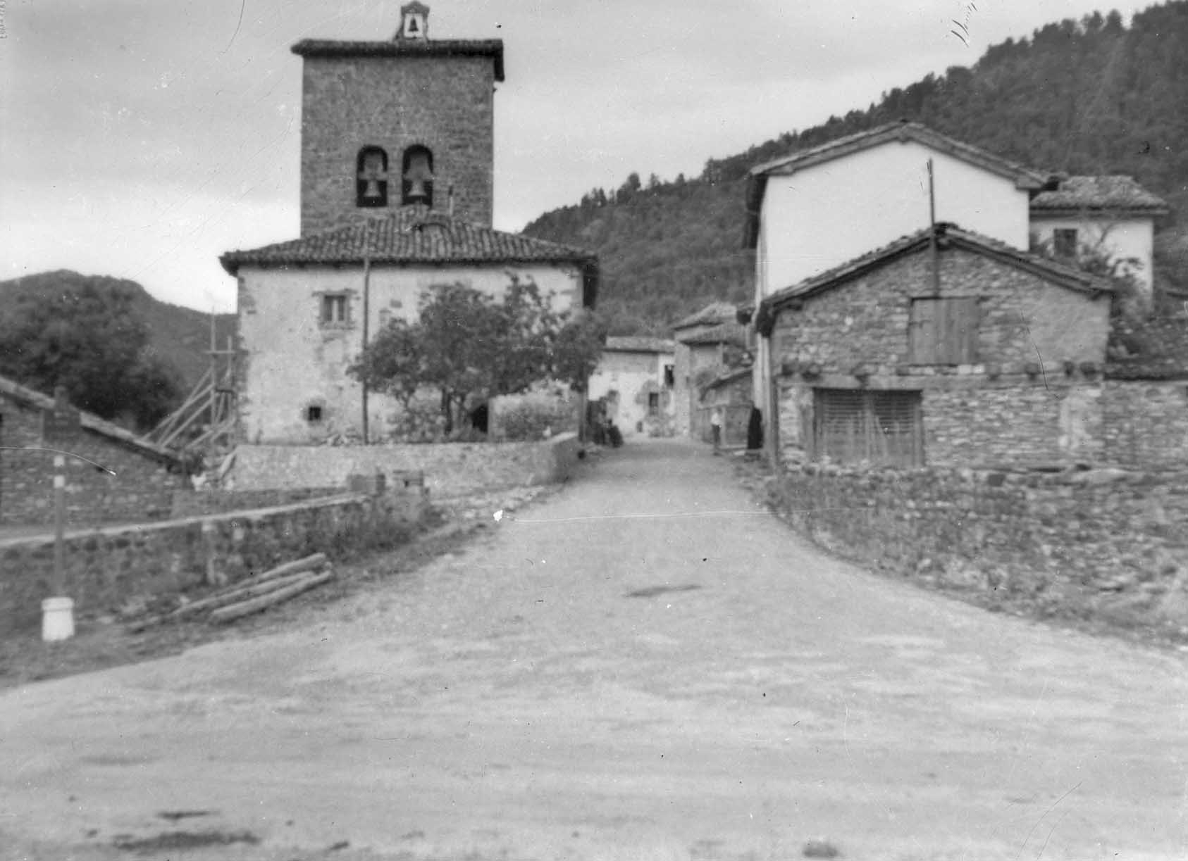 Gorzako ikuspegia 1955. urtean.